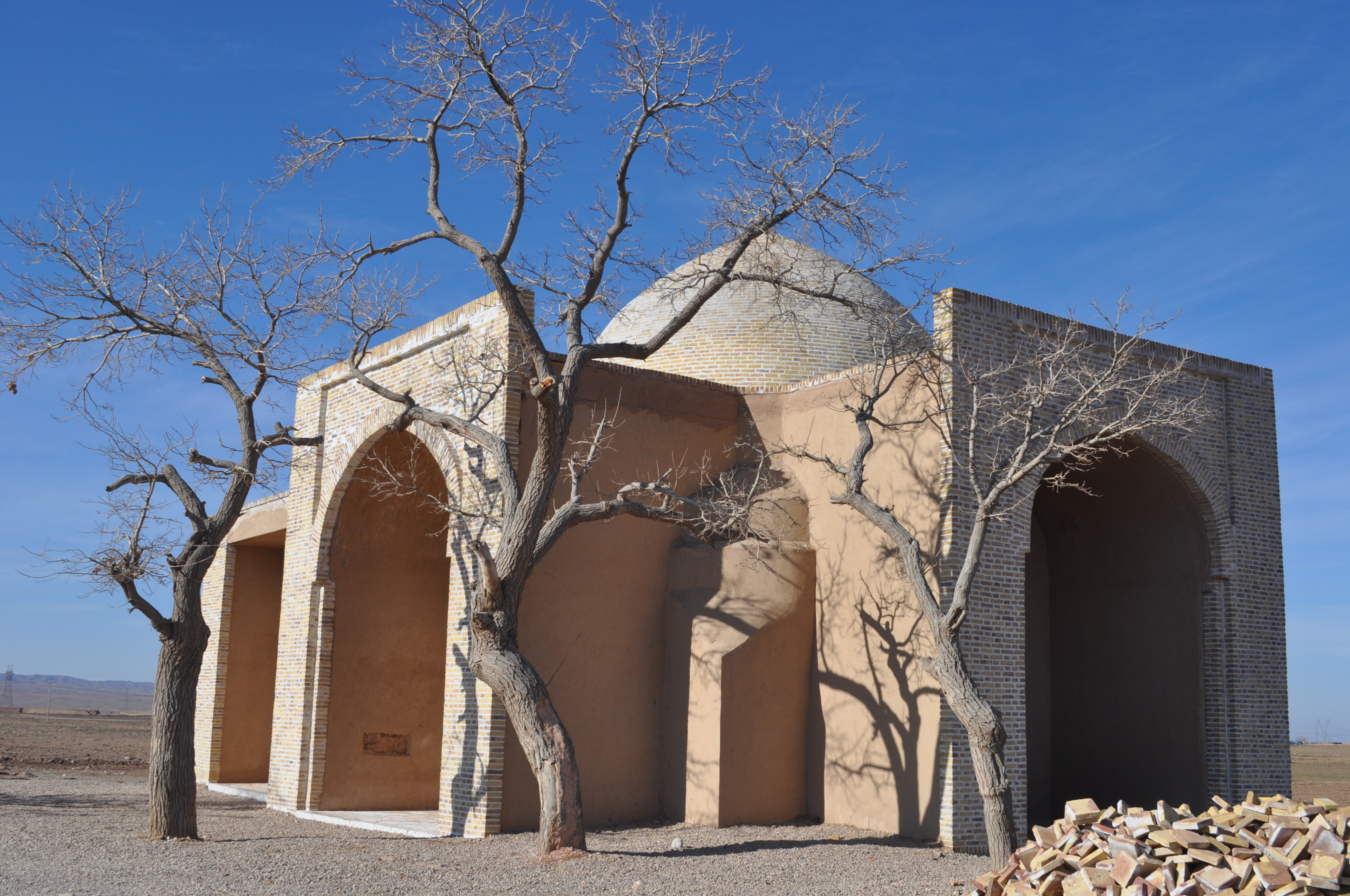 این عکس مربوط به مقبره شیخ اذری از عرفای قرن نهم هجری است.